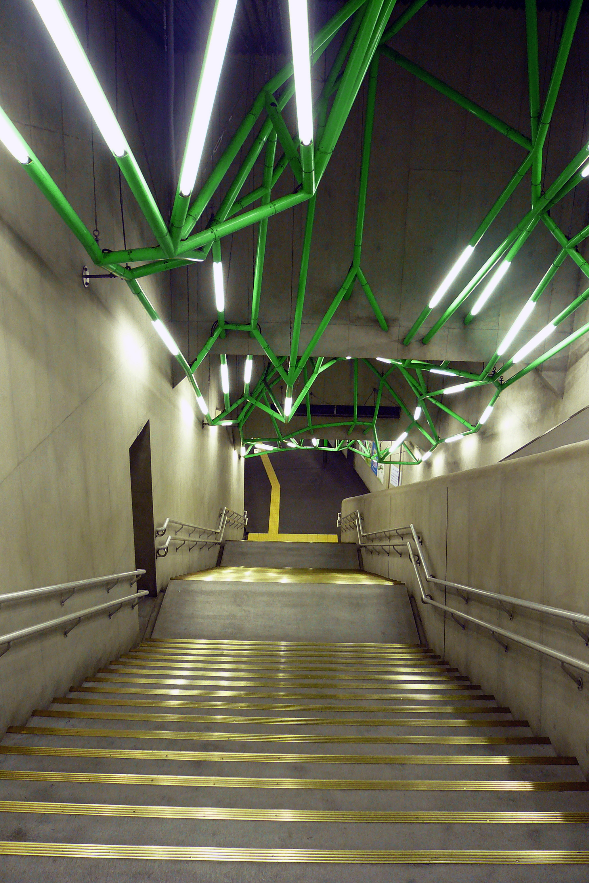 IIdabashi station, Tokyo, Japan